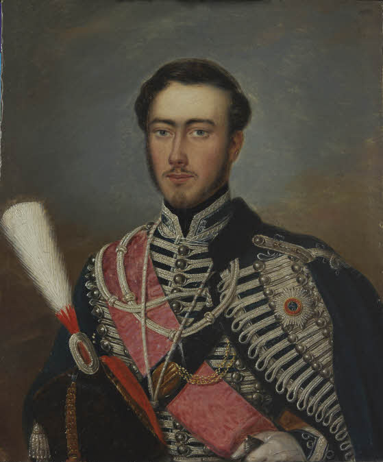 Halbfigur in Uniform als Rittmeister des 2. kurfürstlich hessischen Husaren-Regiments. Er trägt den Bruststern zum Großkreuz des hessischen Hausordens vom Goldenen Löwen. Prinz Alexis (1829-1905) war der älteste Sohn von Landgraf Karl August Philipp Ludwig von Hessen-Philippsthal-Barchfeld und der Bruder des Prinzen Wilhelm